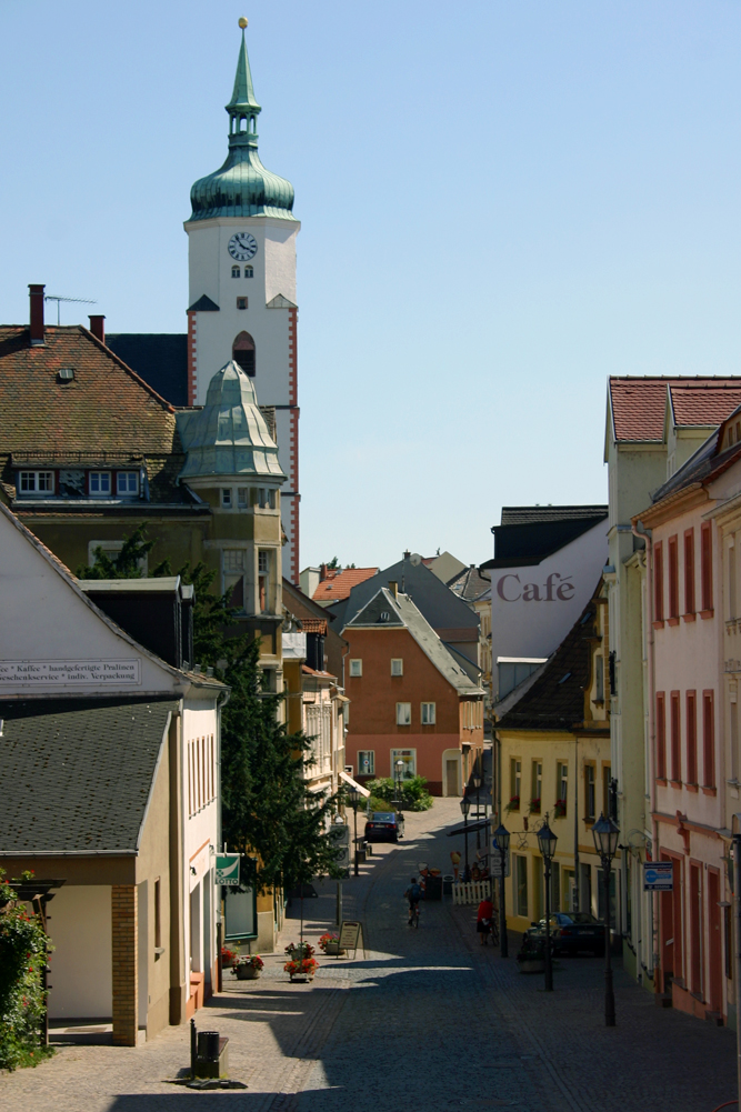 Blick vom Marktplatz zur Wenceslaikirche in Wurzen